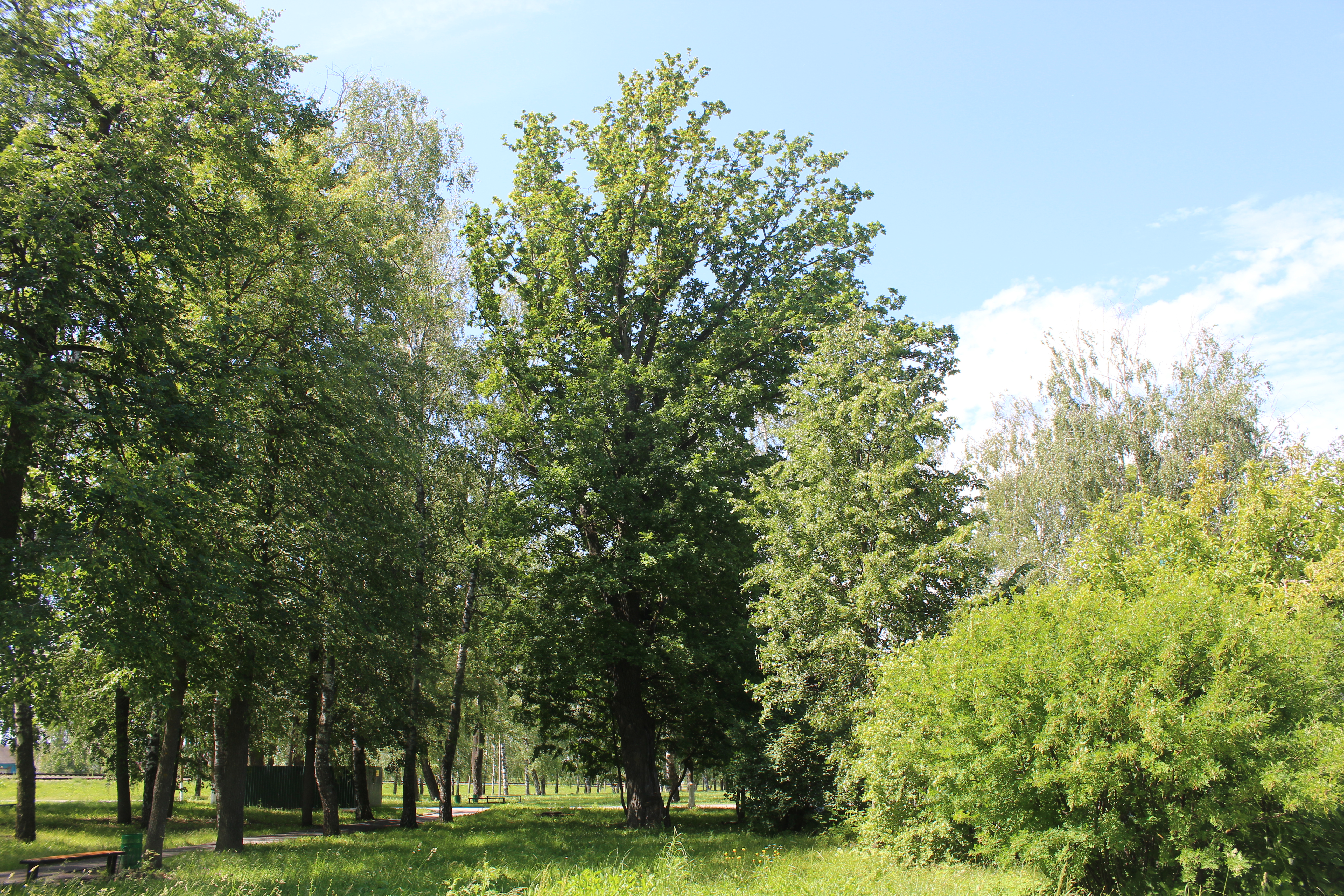 Дуб-долгожитель: Растет в п. Чамзинка на территории парка культуры и отдыха, пгт. Чамзинка, Чамзинский район, Мордовия This image is related to the protected area of Russia number 1320115